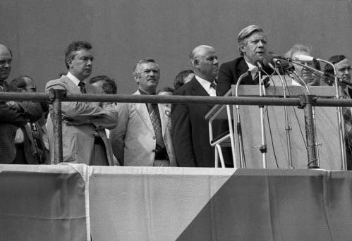 Eröffnung des Europa-Wahlkampfs der SPD mit Bundeskanzler Helmut Schmidt und Willy Brandt in Nürnberg.